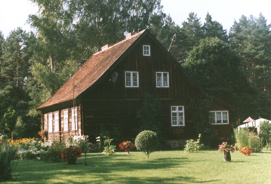 Krutyń, dom Nr 26 (skan 300 dpi)